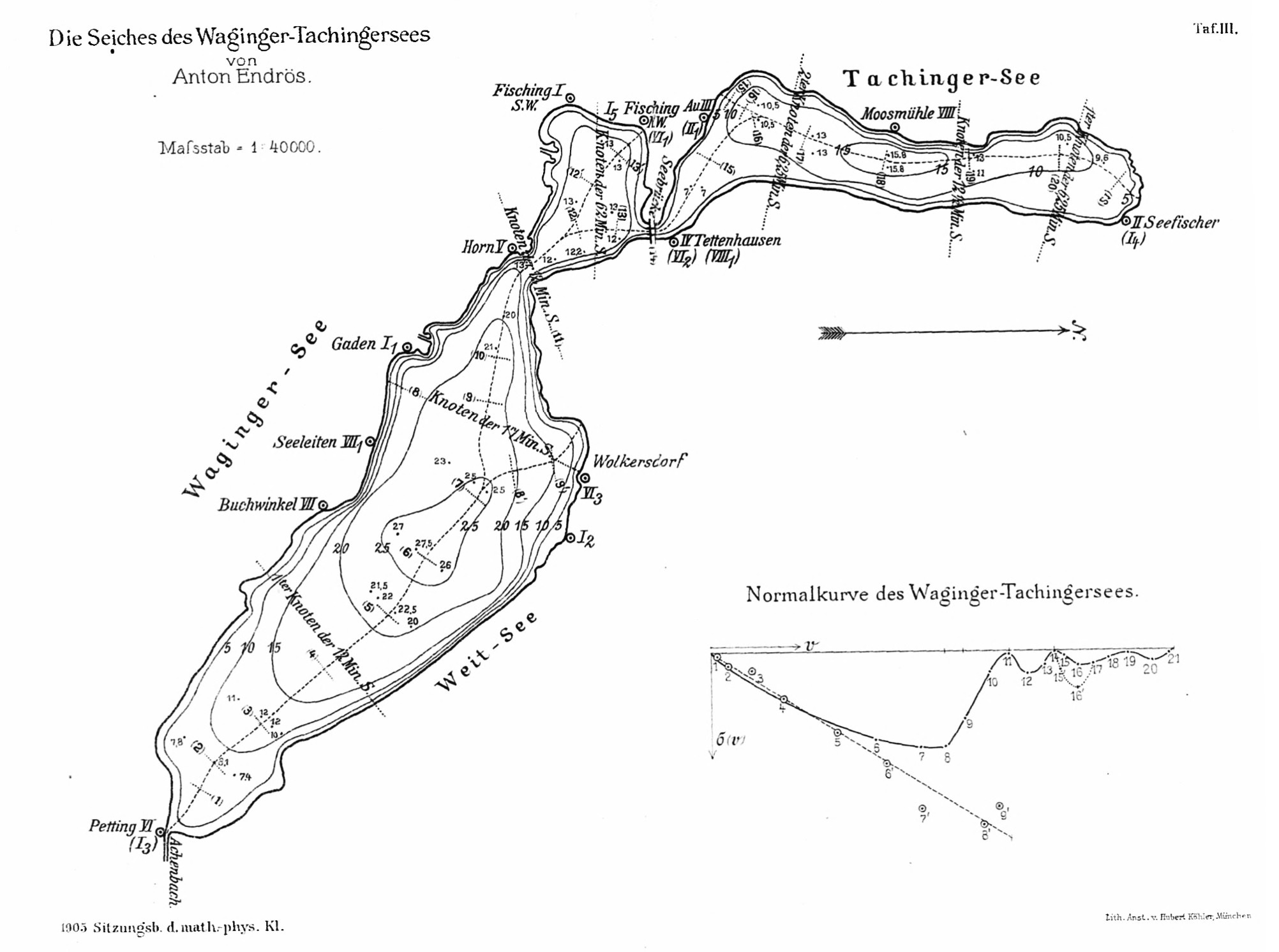 Tiefenkarte des Wagingersee und Tachingersee von Anton Endrös (1905). Erstellt im Zusammenhang mit der Untersuchung der Seeschwankungen (Seiches) der beiden Seen.